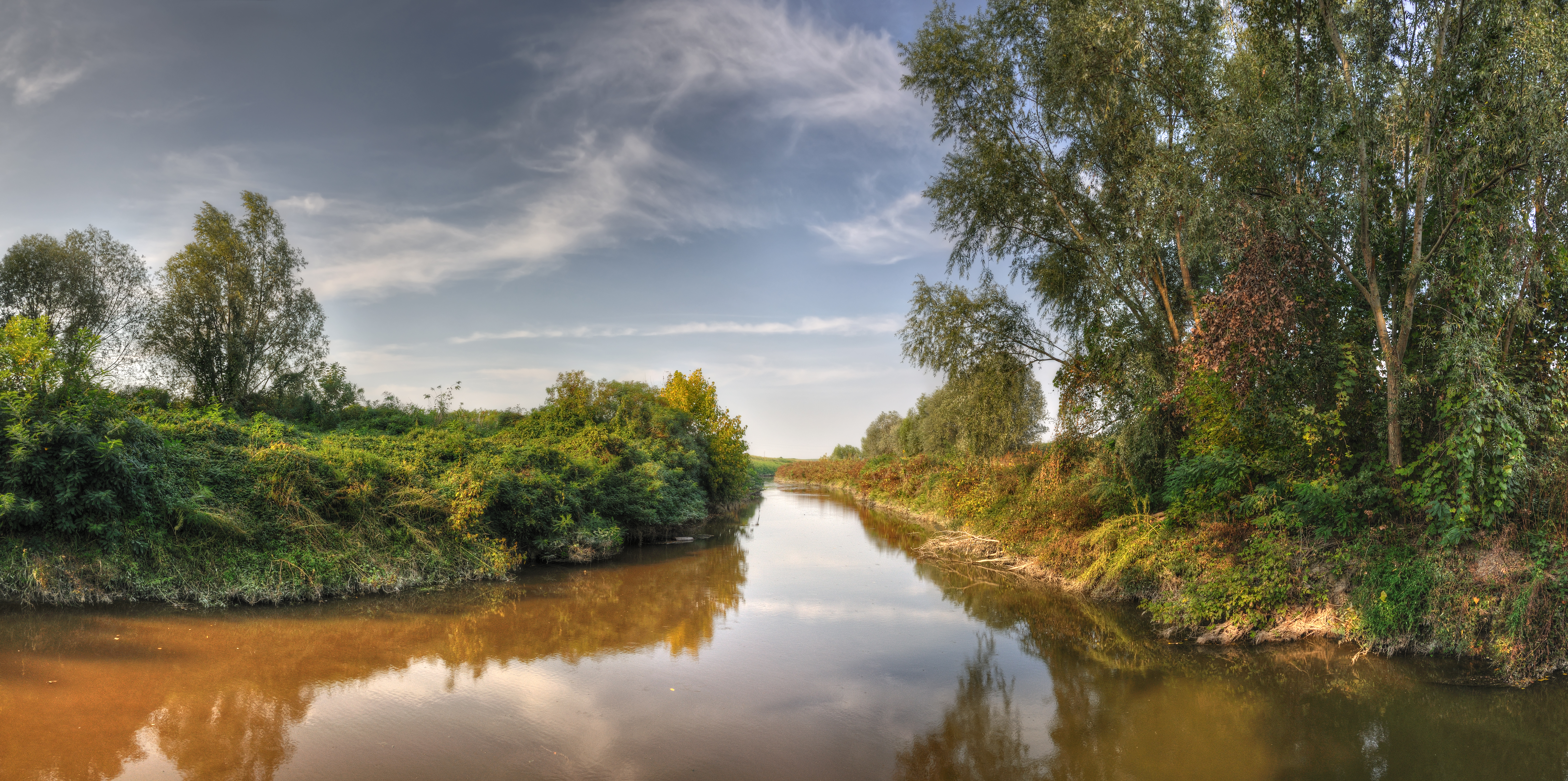 Dove il Canalazzo si immette nel Torrente Crostolo - Santa Vittoria, Gualtieri (RE) Italia - 29 Settembre 2011